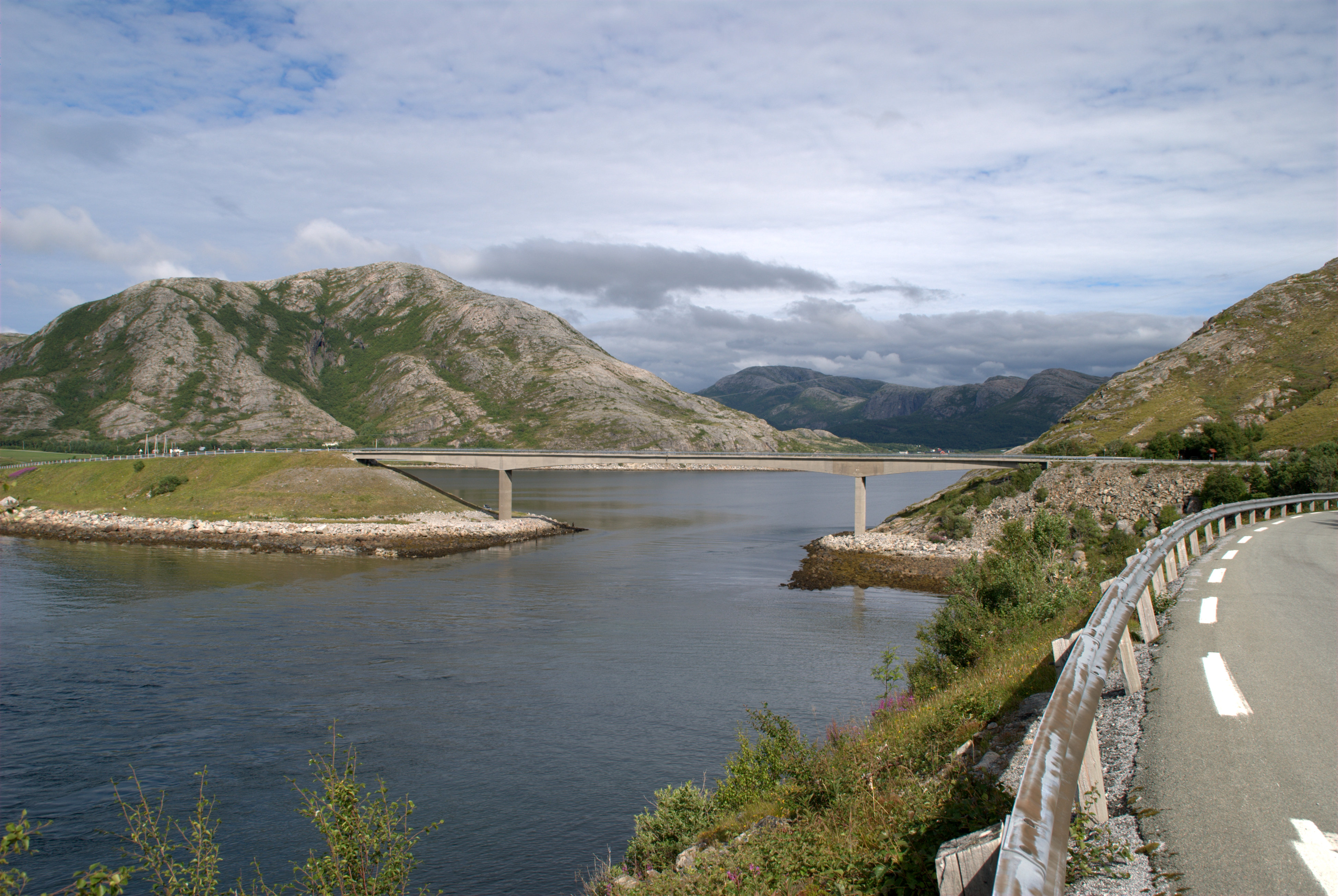 Straumholbrua (181 m) på Fylkesvei 715 ved Osen kommune i Sør-Trøndelag. Kalvhammarfjellet (282 moh) til venstre.